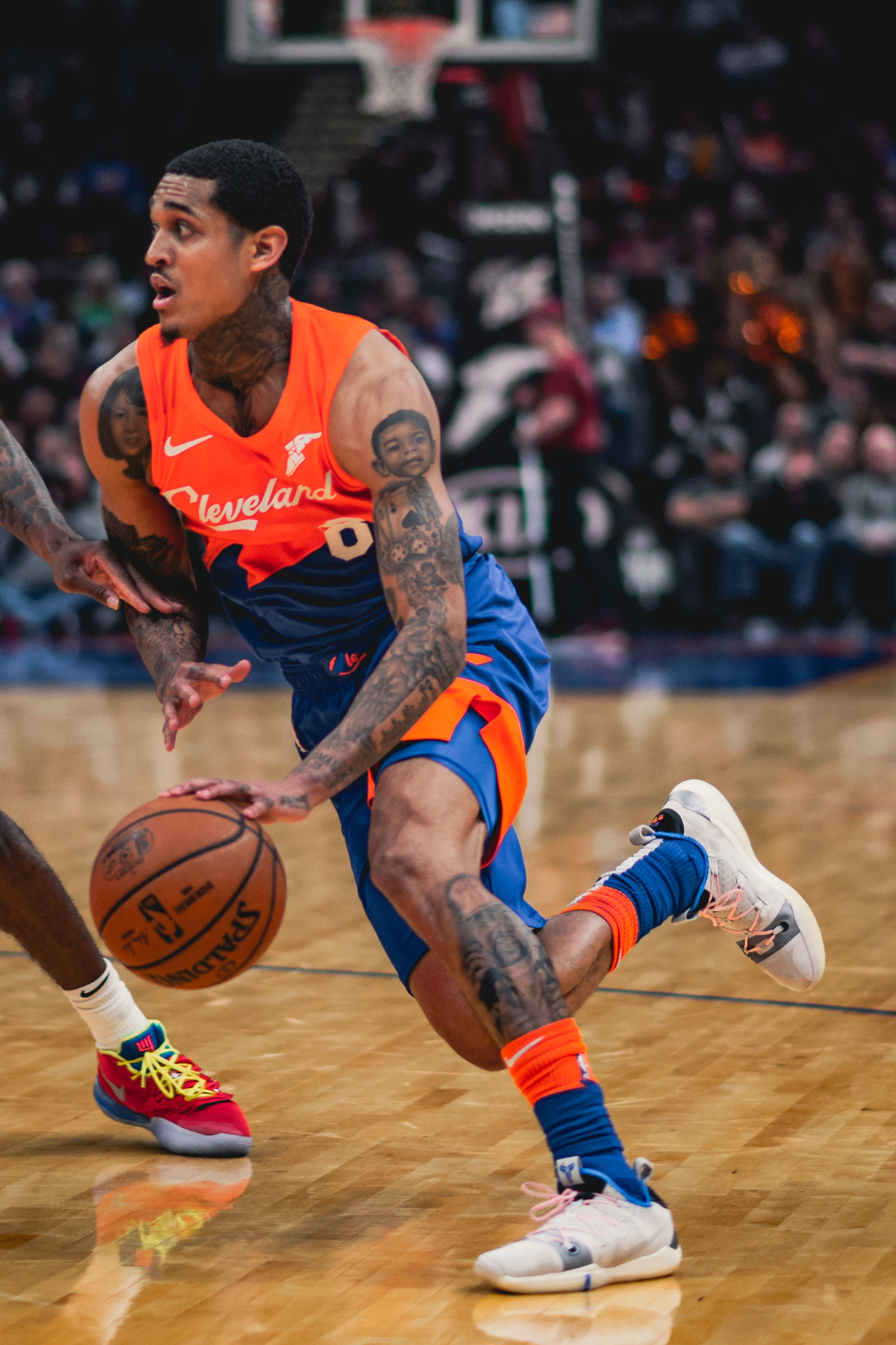 Cleveland Cavaliers vs. Brooklyn Nets